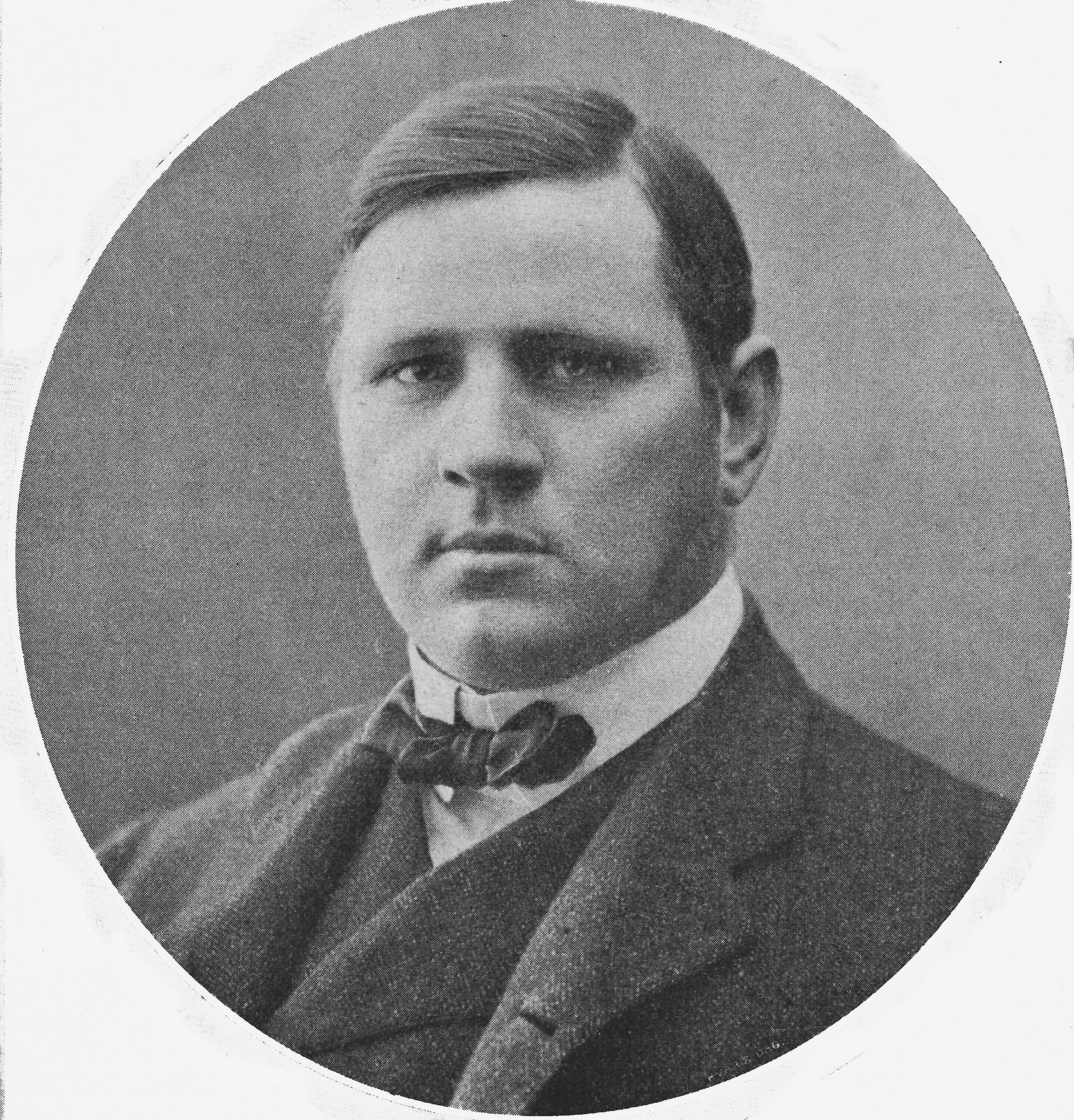 J. Sigfrid Edström (1870-1964) på omslaget av Hvar 8 Dag 1908